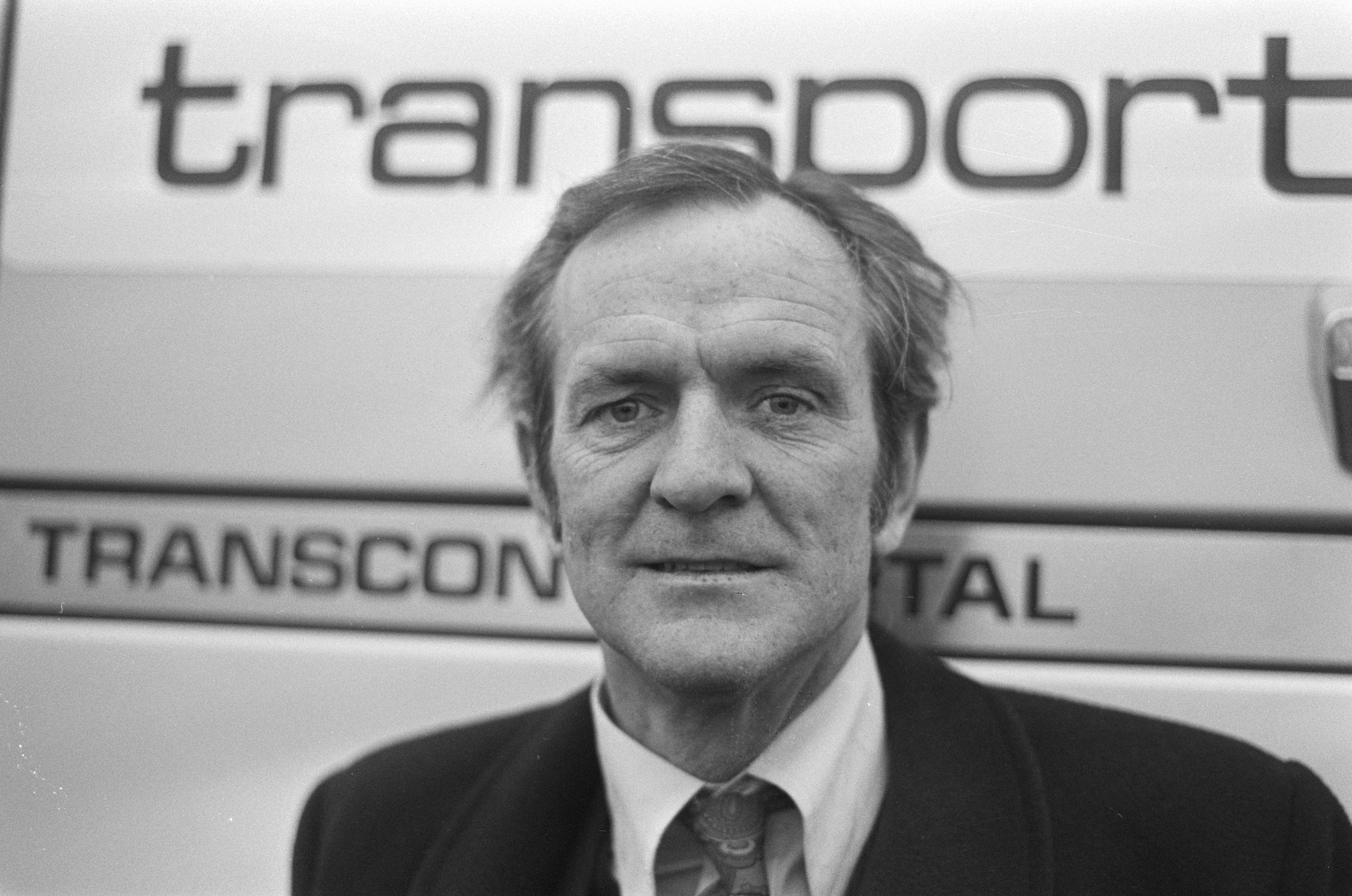 Collectie / Archief : Fotocollectie Anefo Reportage / Serie : [ onbekend ] Beschrijving : Bedrijfsauto RAI 76 ; Pat OConnel alias Edward Hammond in auto Hammond op tentoonstelling, koppen Datum : 4 februari 1976 Trefwoorden : Autos, TENTOONSTELLING Persoonsnaam : Hammond Fotograaf : Peters, Hans / Anefo Auteursrechthebbende : Nationaal Archief Materiaalsoort : Negatief (zwart/wit) Nummer archiefinventaris : bekijk toegang 2.24.01.05 Bestanddeelnummer : 928-4014 Reacties Geplaatst door TV-serie fan op 14 juli 2015 - 23:02. Bedrijfsauto RAI 76 geopend door Patrick O'Connell alias Edward Hammond acteur uit de BBC televisieserie 'The Brothers' (1972-1976) over het transportbedrijf Hammond, uitgezonden in Nederland onder de naam 'de gebroeders Hammond' bij de AVRO televisie.(oktober 1974-1977)